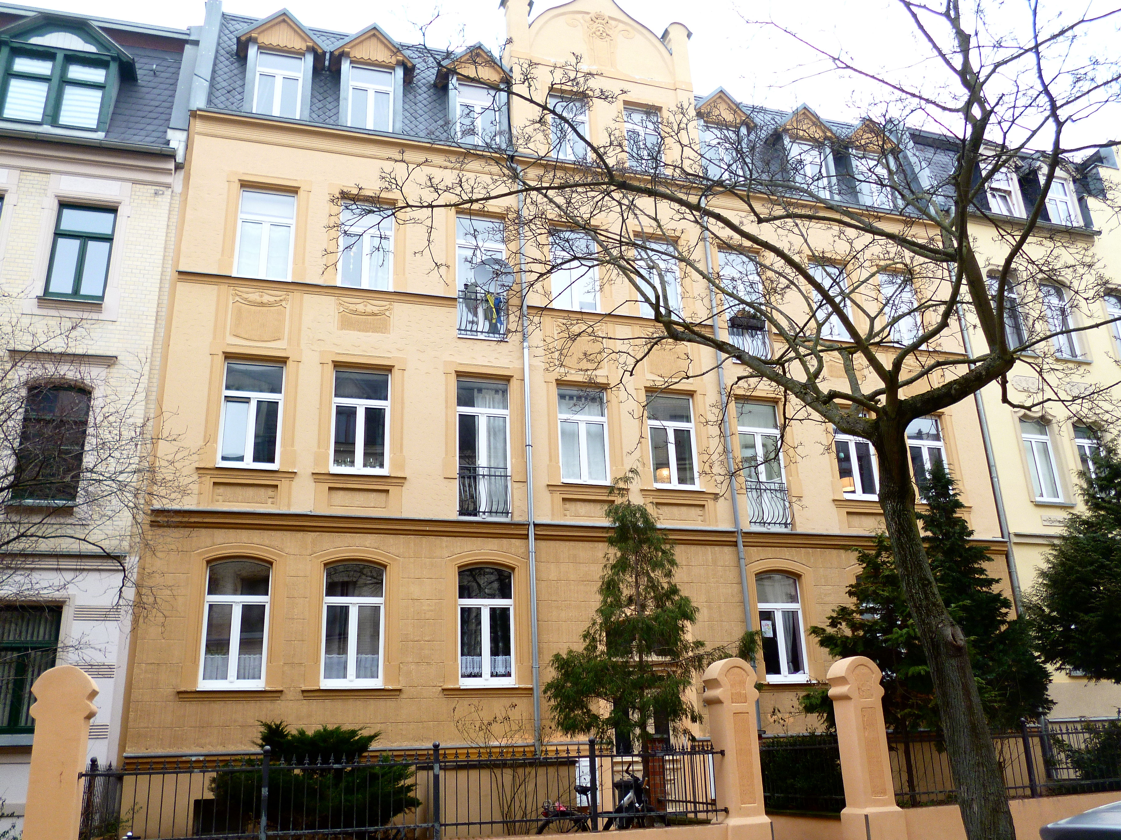 Rudolf-Haym-Straße 28, Halle (Saale)